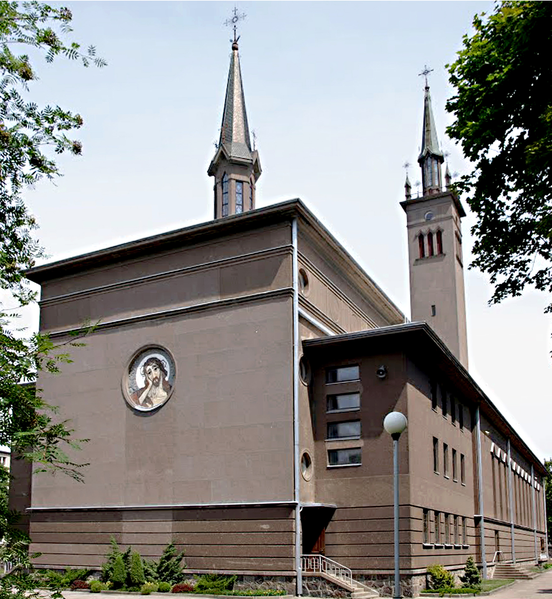 Klaipėdos Marijos Taikos Karalienės bažnyčios apsidės vaizdas 1991